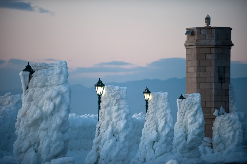 Senjska riva, Senj